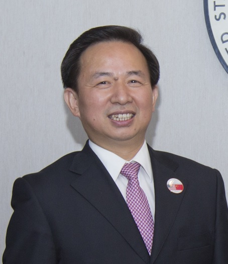 2013年7月11日，环境保护部副部长李干杰出席第五轮中美战略与经济对话并会见美国环保局、美国贸易发展署及美国核管制委员会官员。